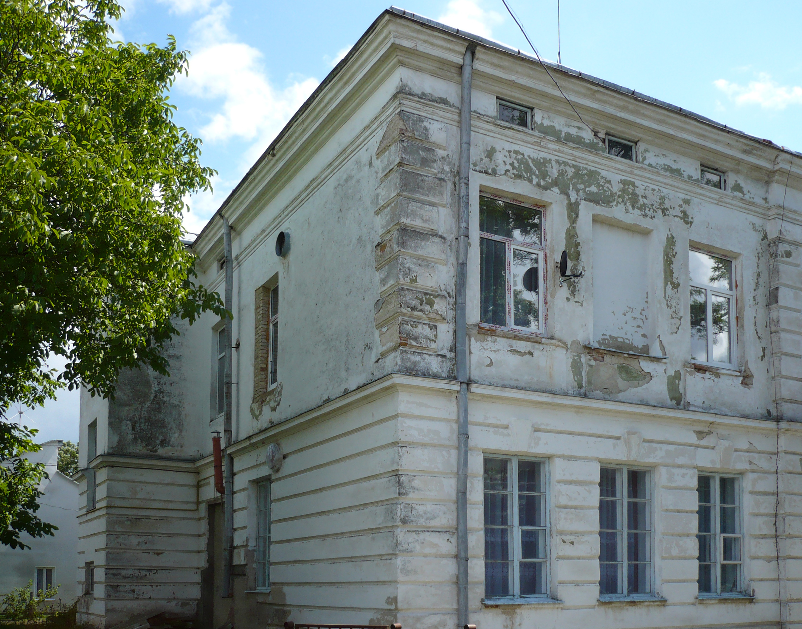 Biały Kamień na Ukrainie - stara szkoła